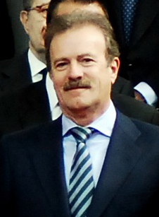 El periodista español Manuel Campo Vidal